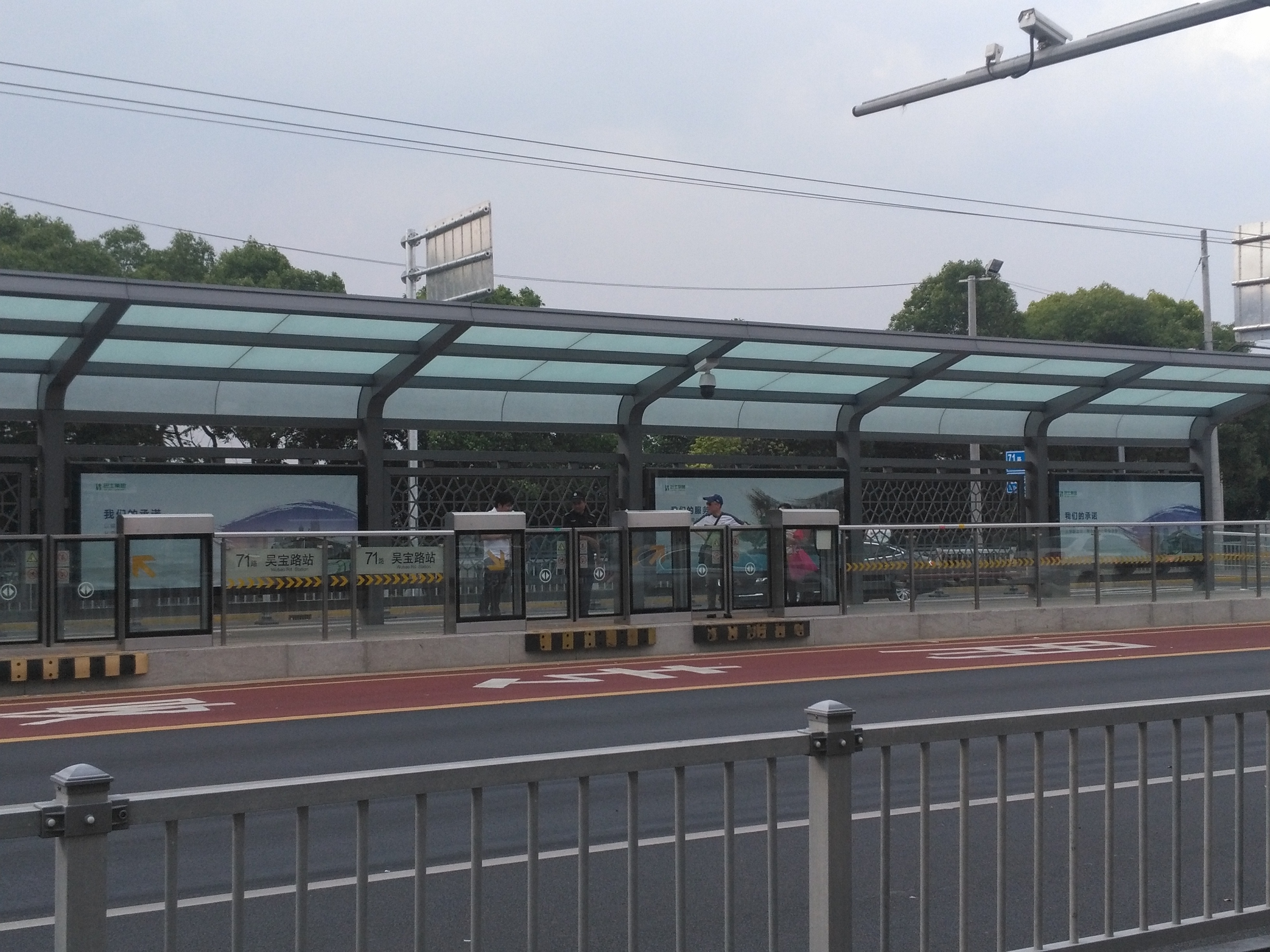 中文（中国大陆）: 延安路中运量公交系统吴宝路站